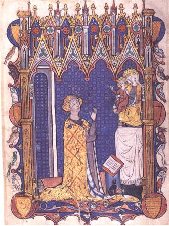 Hodinky Jolandy ze Soissons